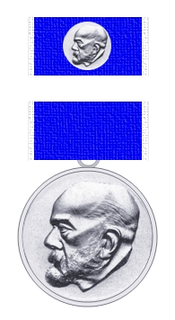 Medaille des Ehrentitels Verdienter Arzt des Volkes in der Variante nach 1978